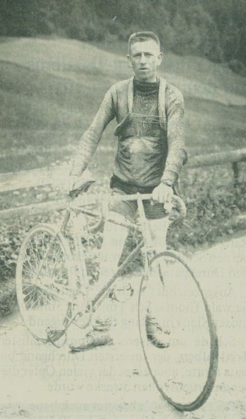 Der Radrennfahrer und Skisportler Josef Trixl-Hellensteiner